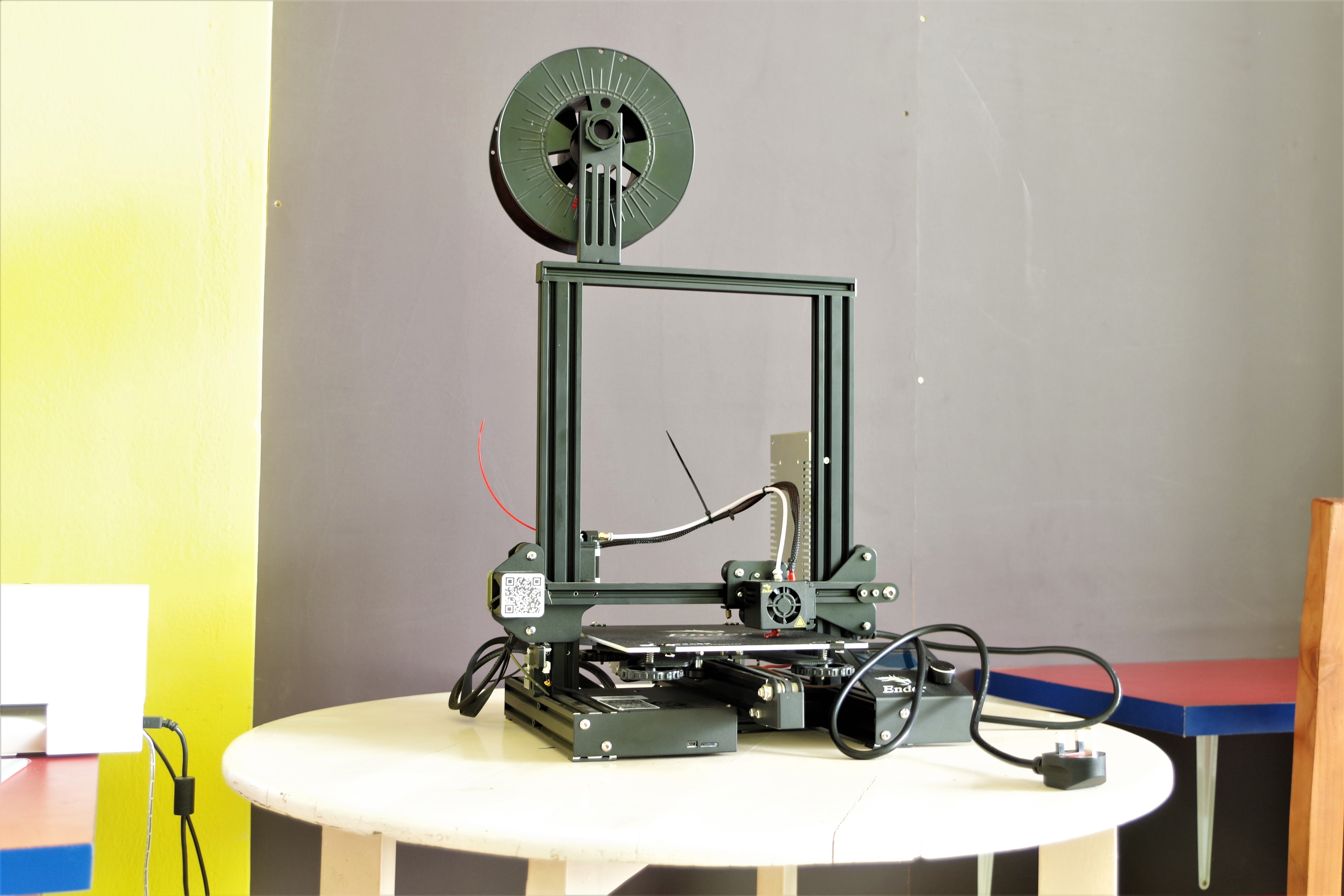 C'est une imprimante 3D acquise pour Blolab premier fablab béninois. cette photo a été prise lors d'un de leur événements a l’institut français de Cotonou au Bénin.